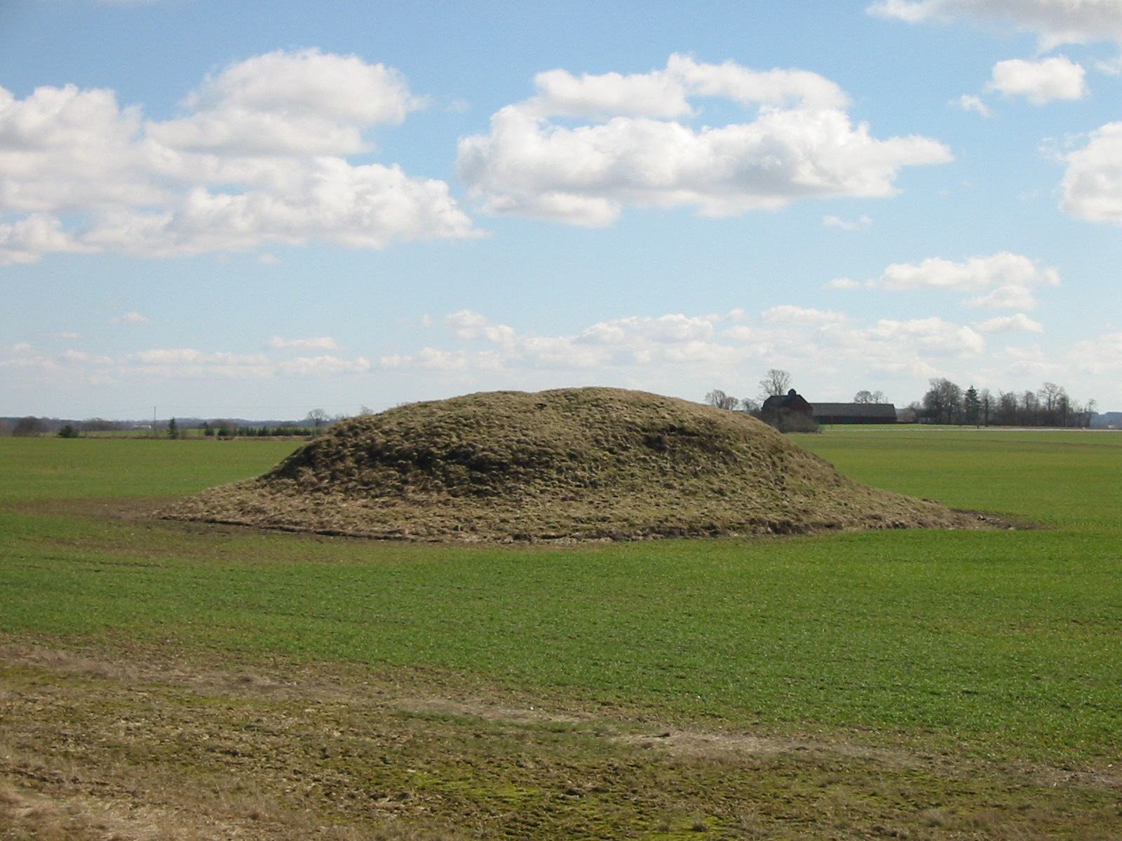 Bronsåldershög vid Gårdstånga. Foto: Richard Johansson.